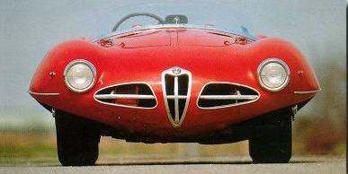 automobile spider